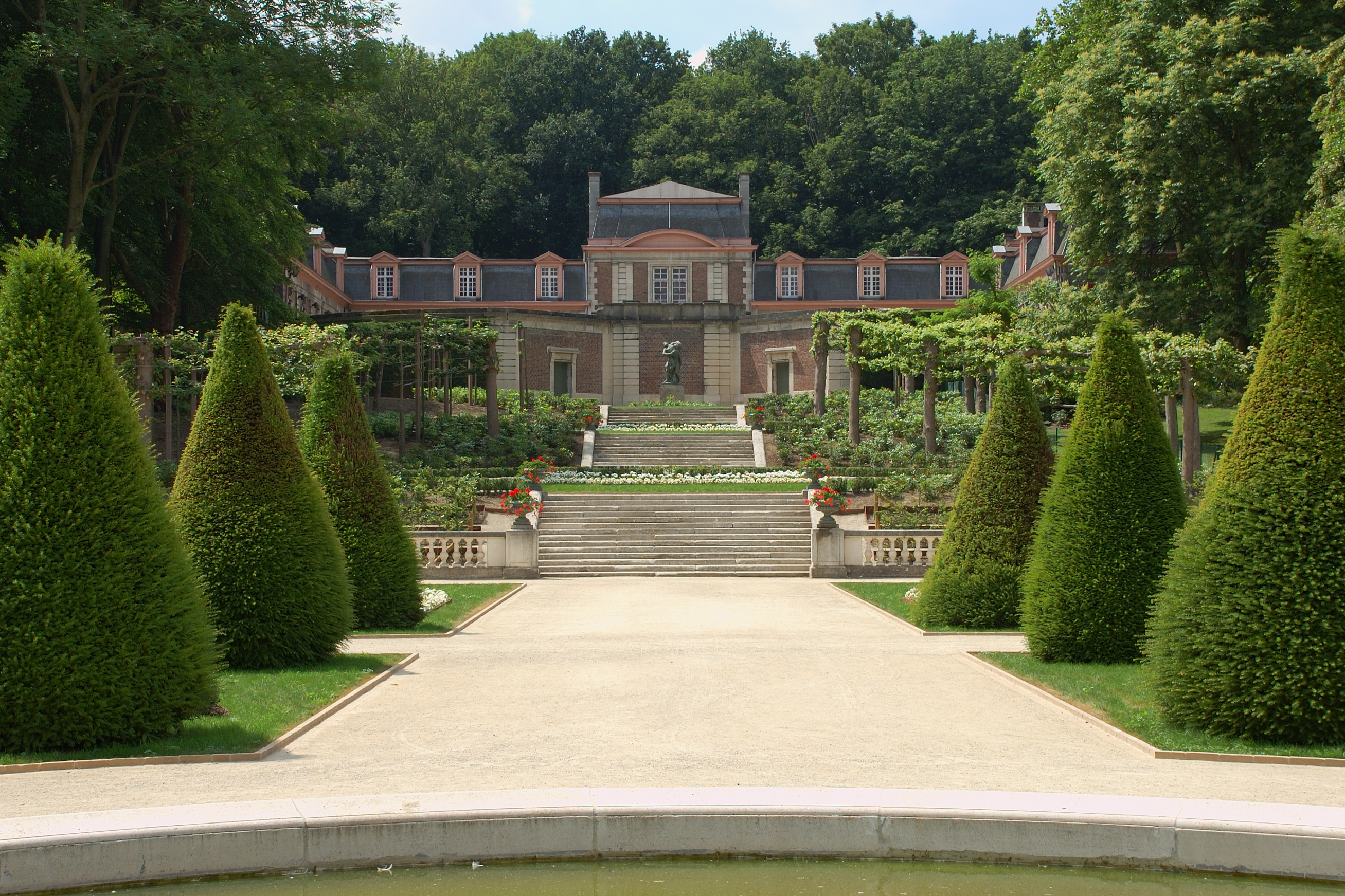 Domein 3 fonteinen, Vlaams Brabant, Vilvoorde